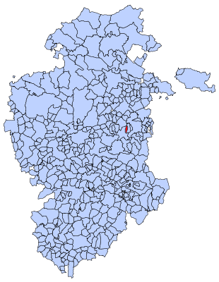 Espinosa del Camino en Burgos